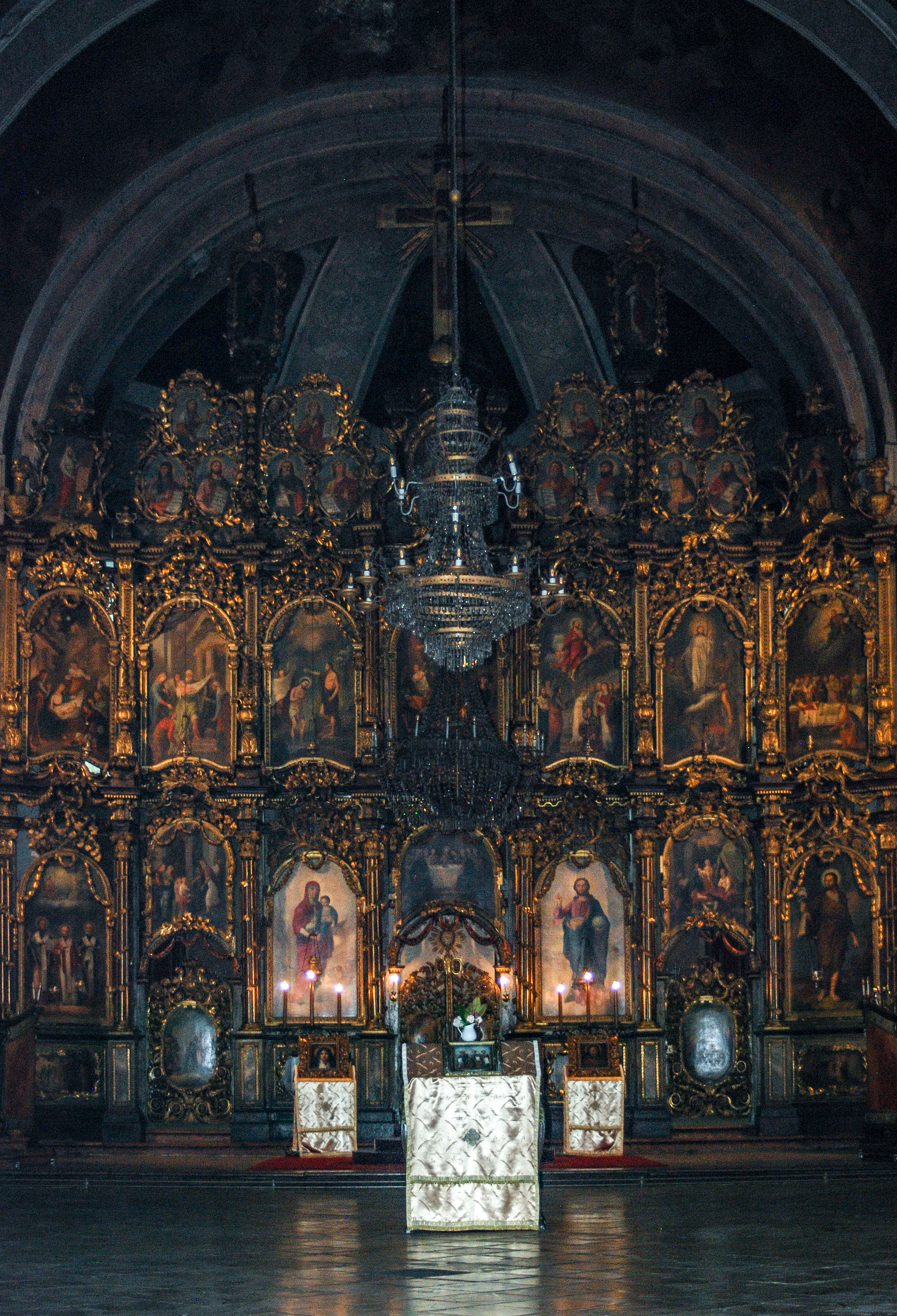 Ikone ikonostas